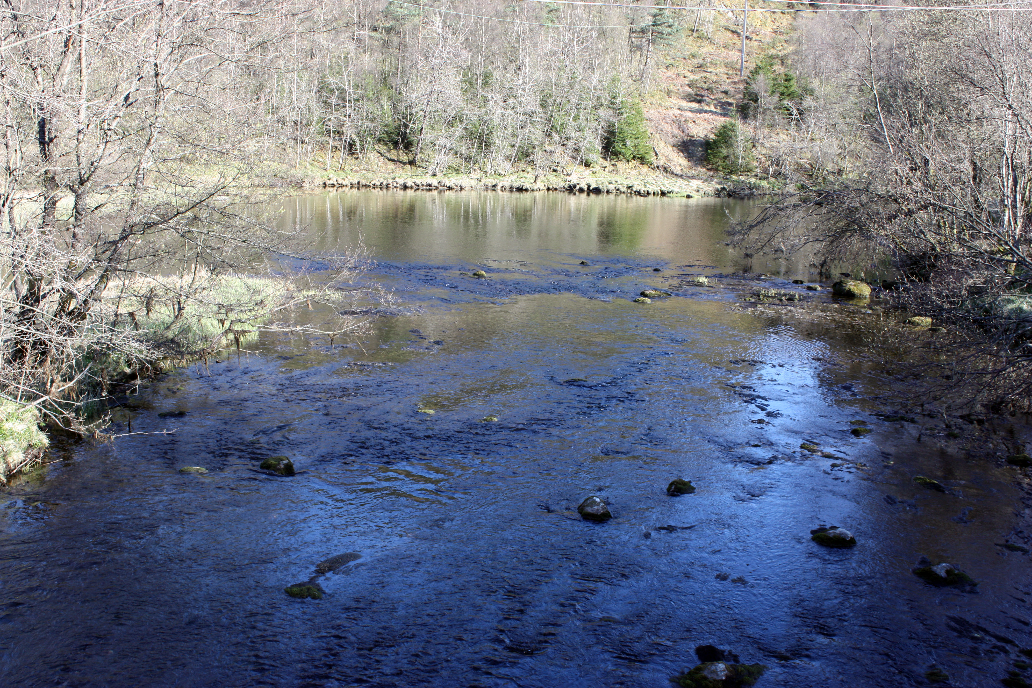 Oselva